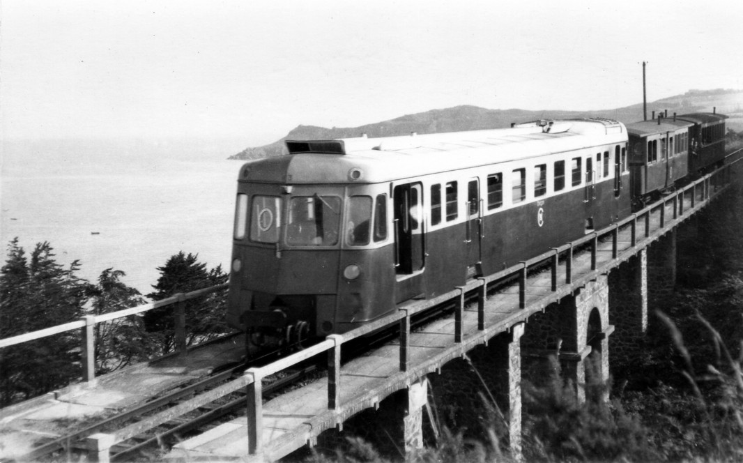 Renault ABH 6 des Chemins de fer des Côtes du Nord.